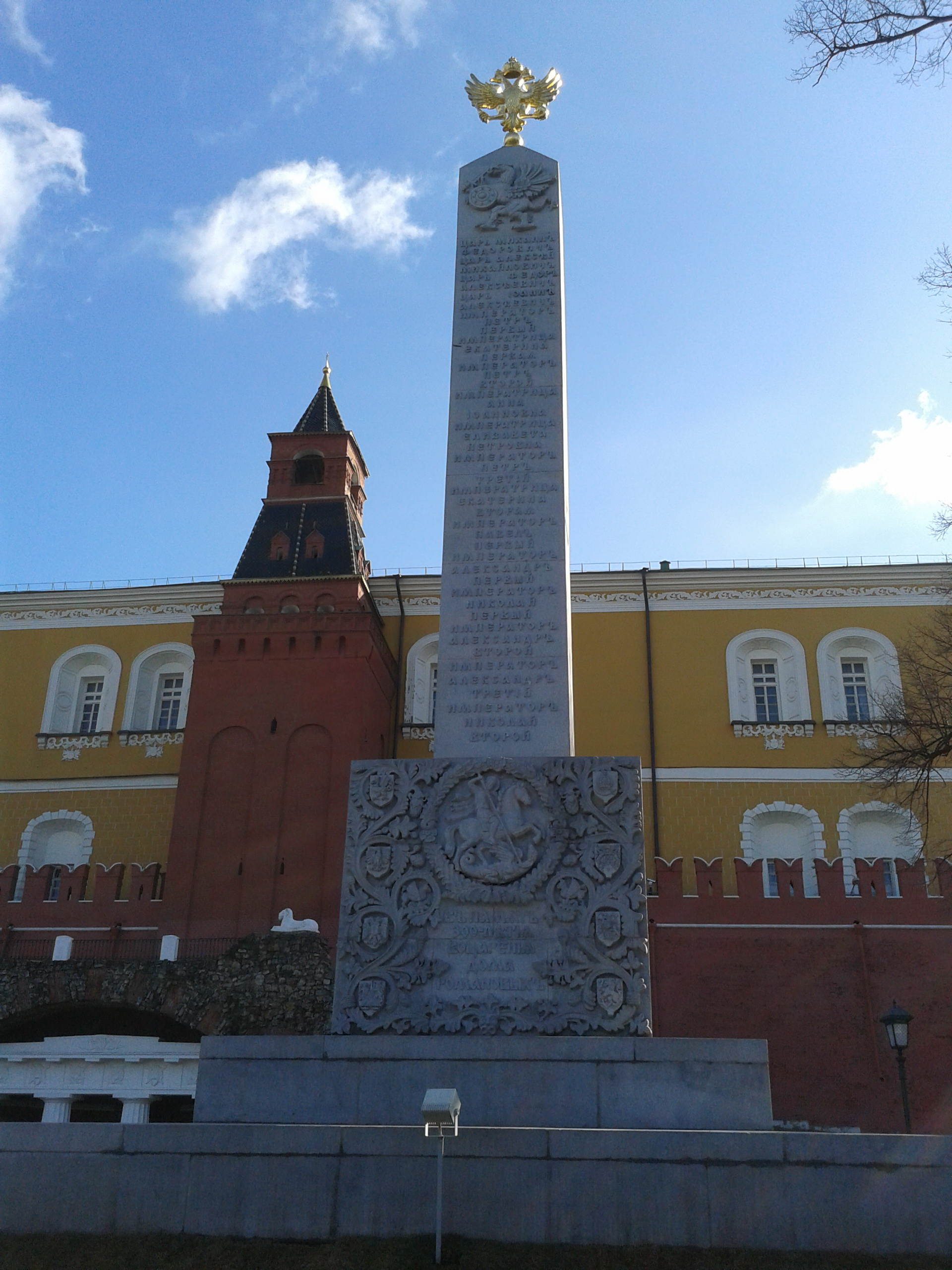 Романовский обелиск. Александровский сад, Москва. 2013